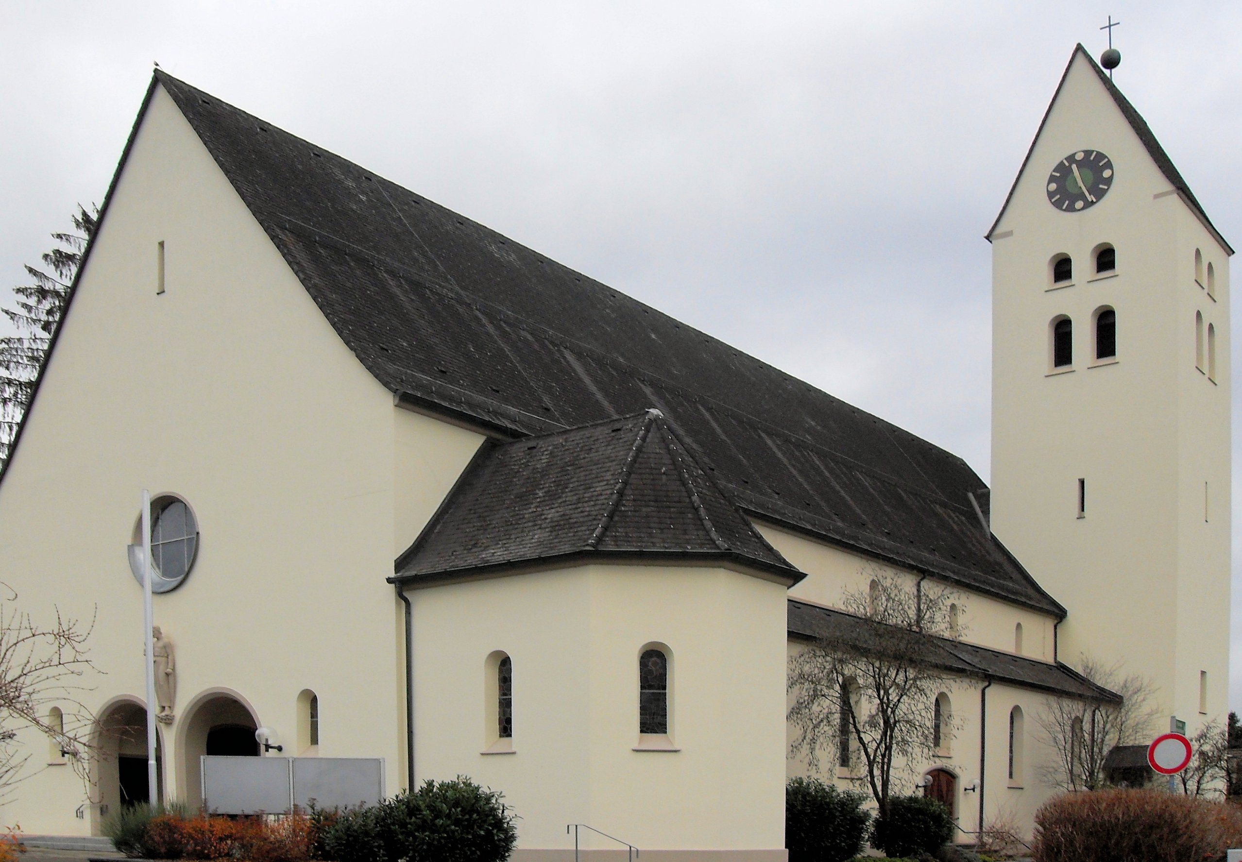 Katholische Kirche St. Josef in Albbruck